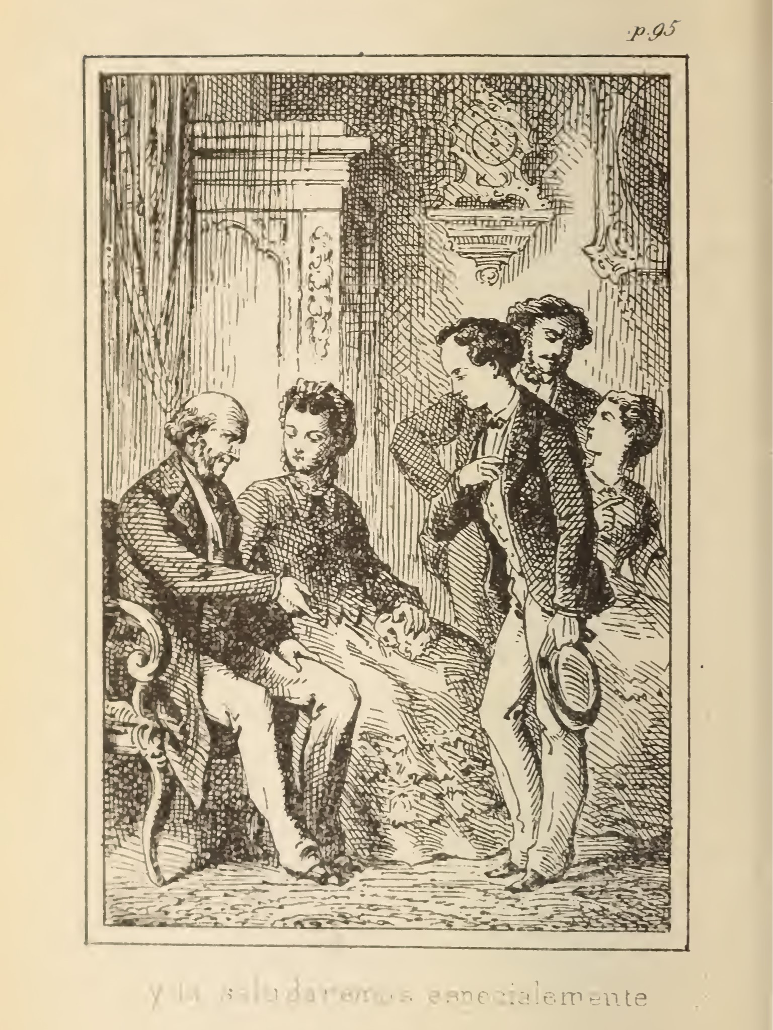 Ilustración del libro de Manuel Antonio Carreño, Compendio del manual de urbanidad y buenas maneras (Lima, 1875, p. 95). El texto a pie de imagen dice: «y la saludaremos especialmente».